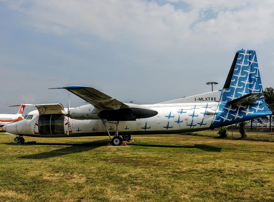 FOKKER 27 esposto a Volandia